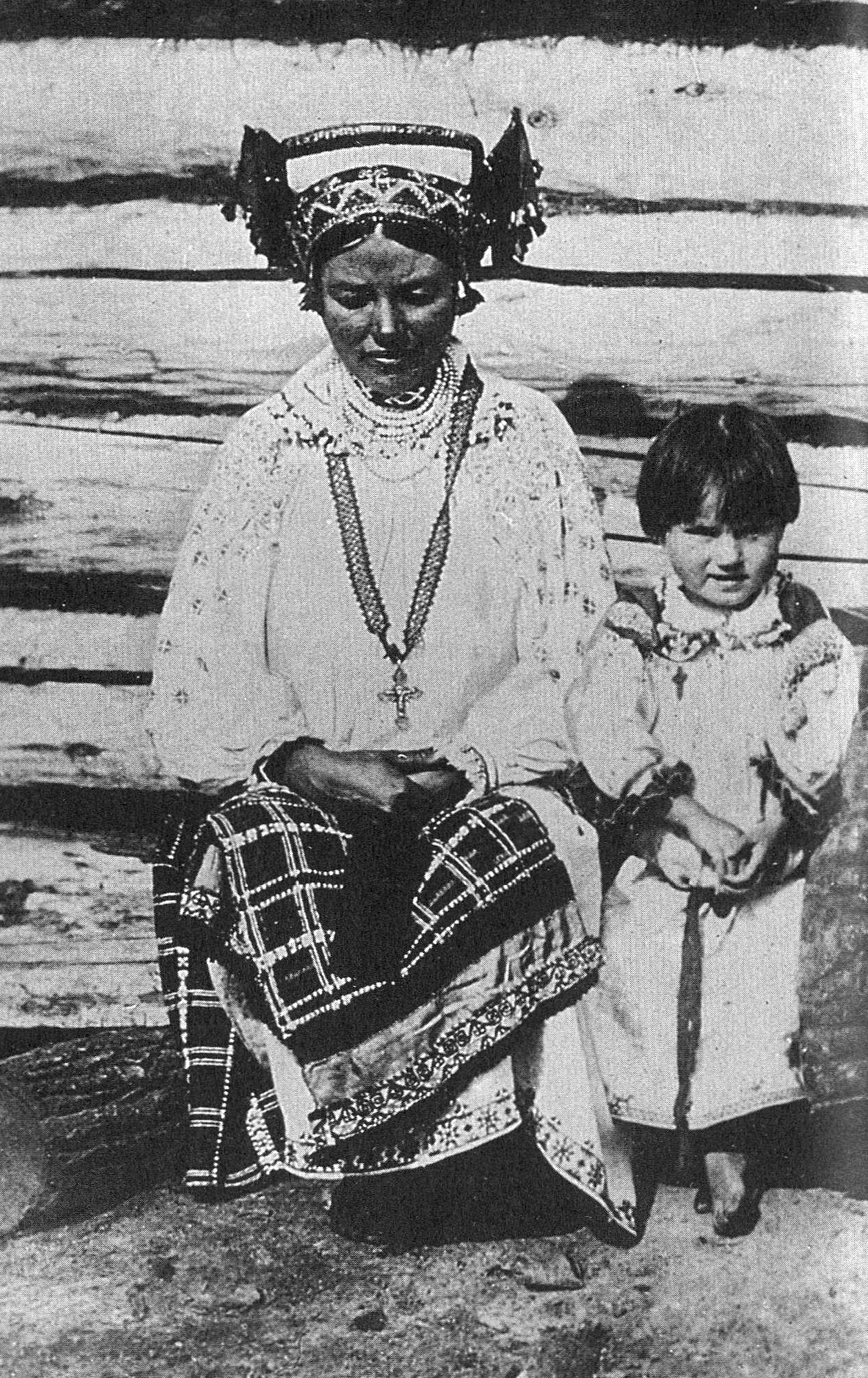 Женщина с ребёнком в праздничной ожежде. Орловская губ., Севский у., дер. Логаревка. 1904. РЭМ